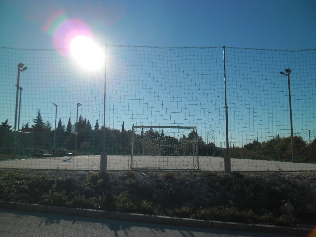 igralište u Banićima